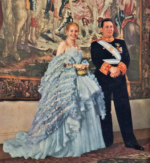 Juan Domingo y Eva Perón en una cena protocolar en 1947.